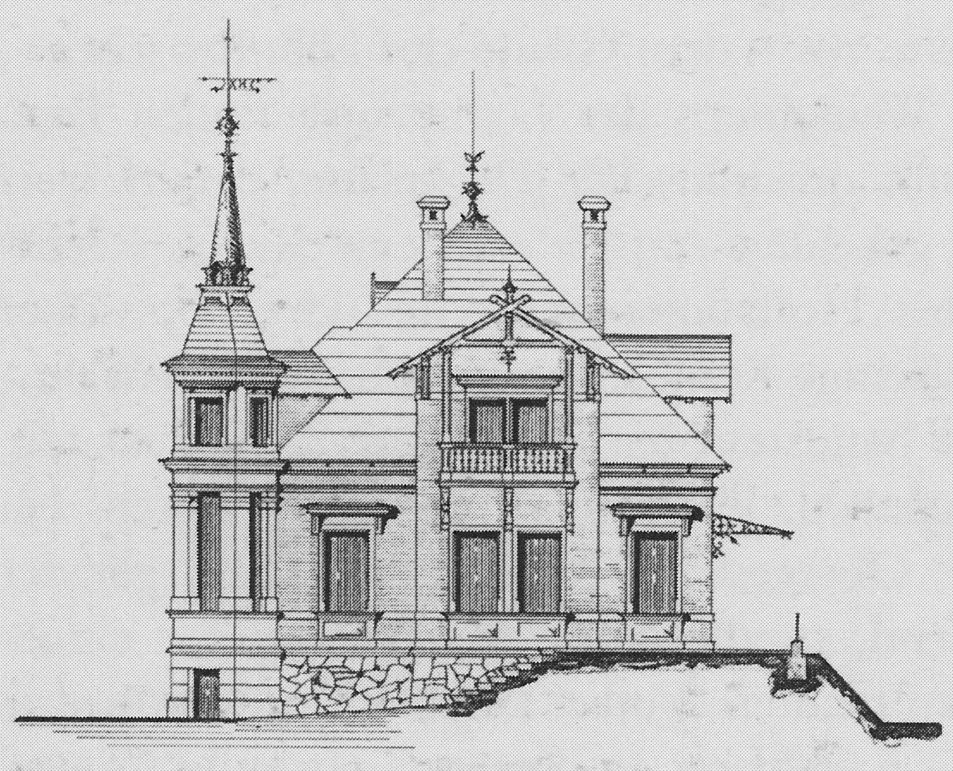 Radebeul Villa Annabella Bauzeichnung 1897